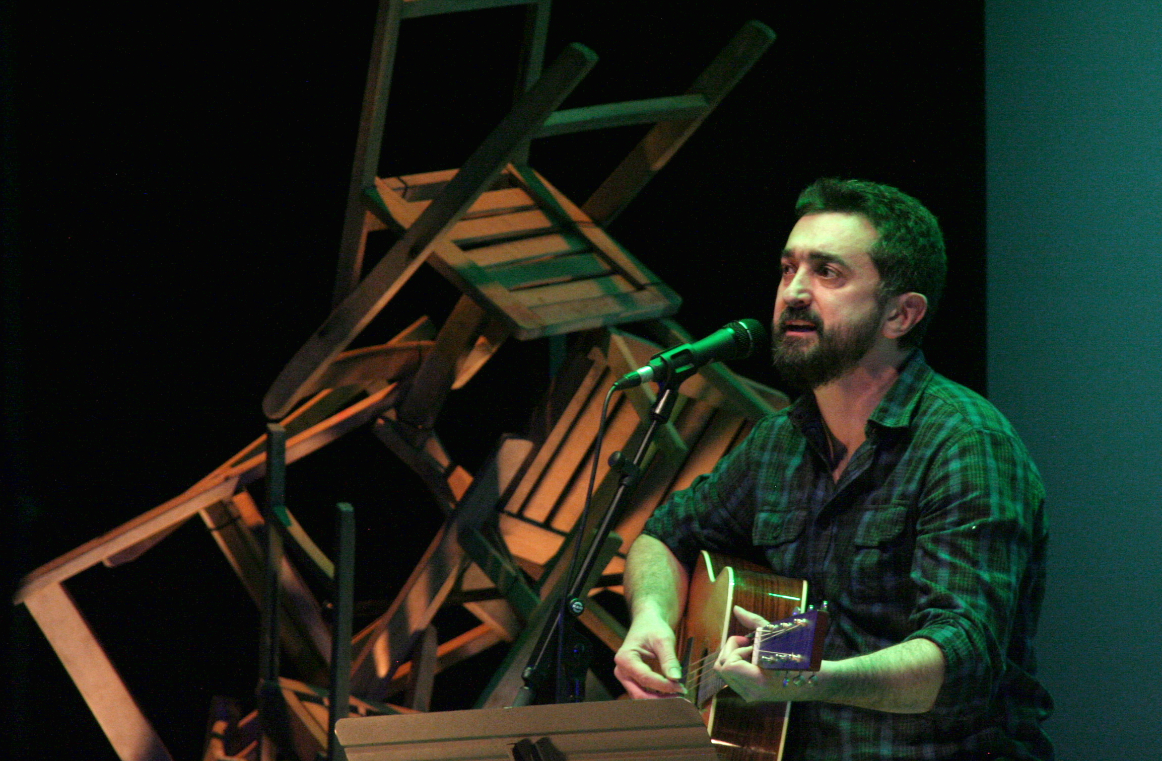 Al capdavall som bàrbars. Homenatge a Joan Oliver realitzat el 30 de novembre de 2016 al Teatre de la Faràndula de Sabadell.